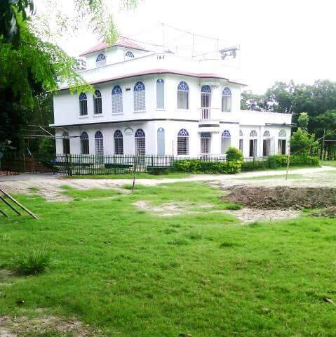 খাস আমিনপুর খানকা পাক আমিনপুর থানার মধ্যে প্রসিদ্ধ।এখানে সাপ্তাহিক এবং মাসিক ধর্মীয় অনুস্টান পালিত হয়।